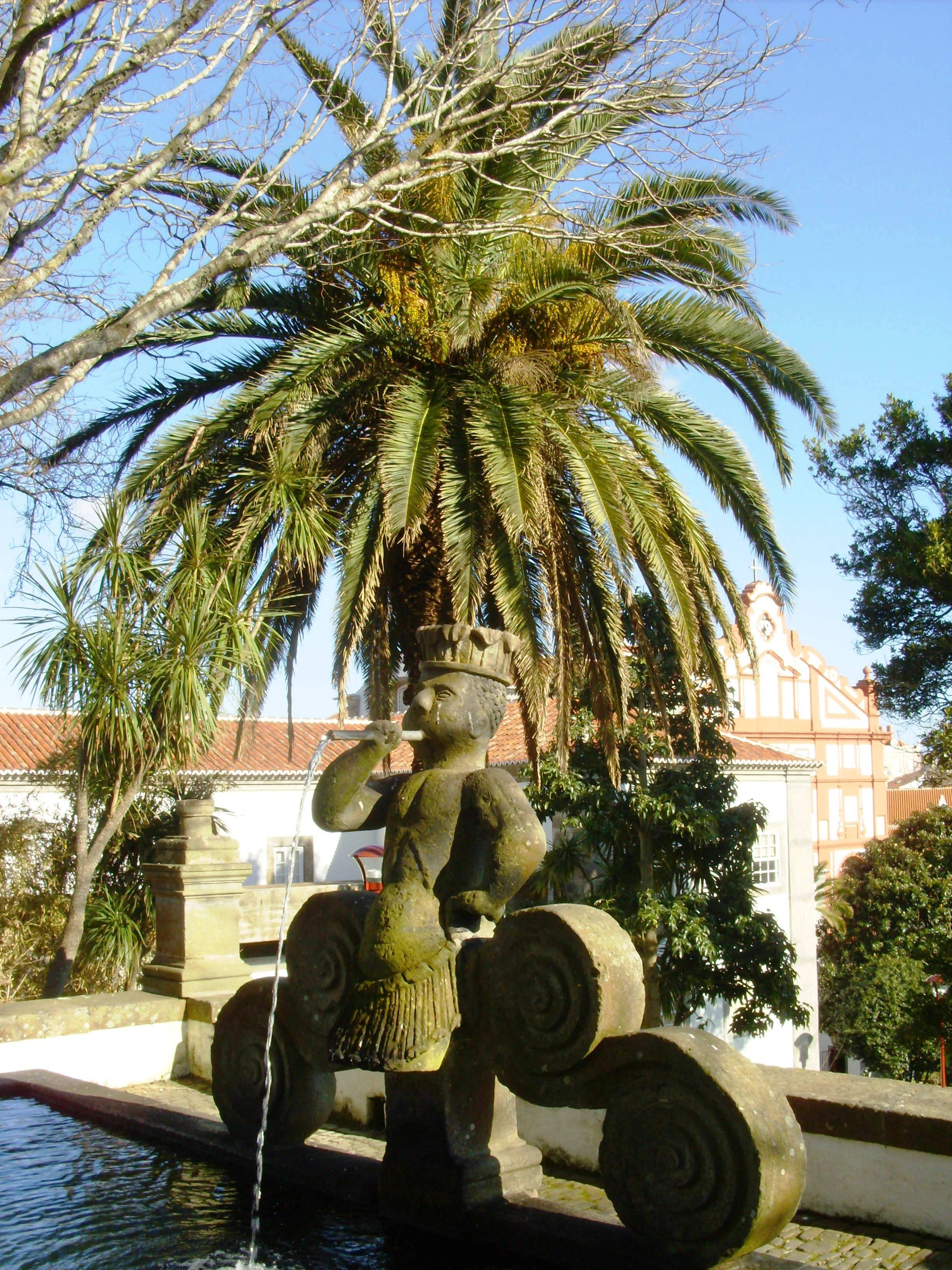 Tanque do "Preto", Jardim Duque da Terceira, Angra do Heroísmo, Ilha Terceira, Açores: detalhe.